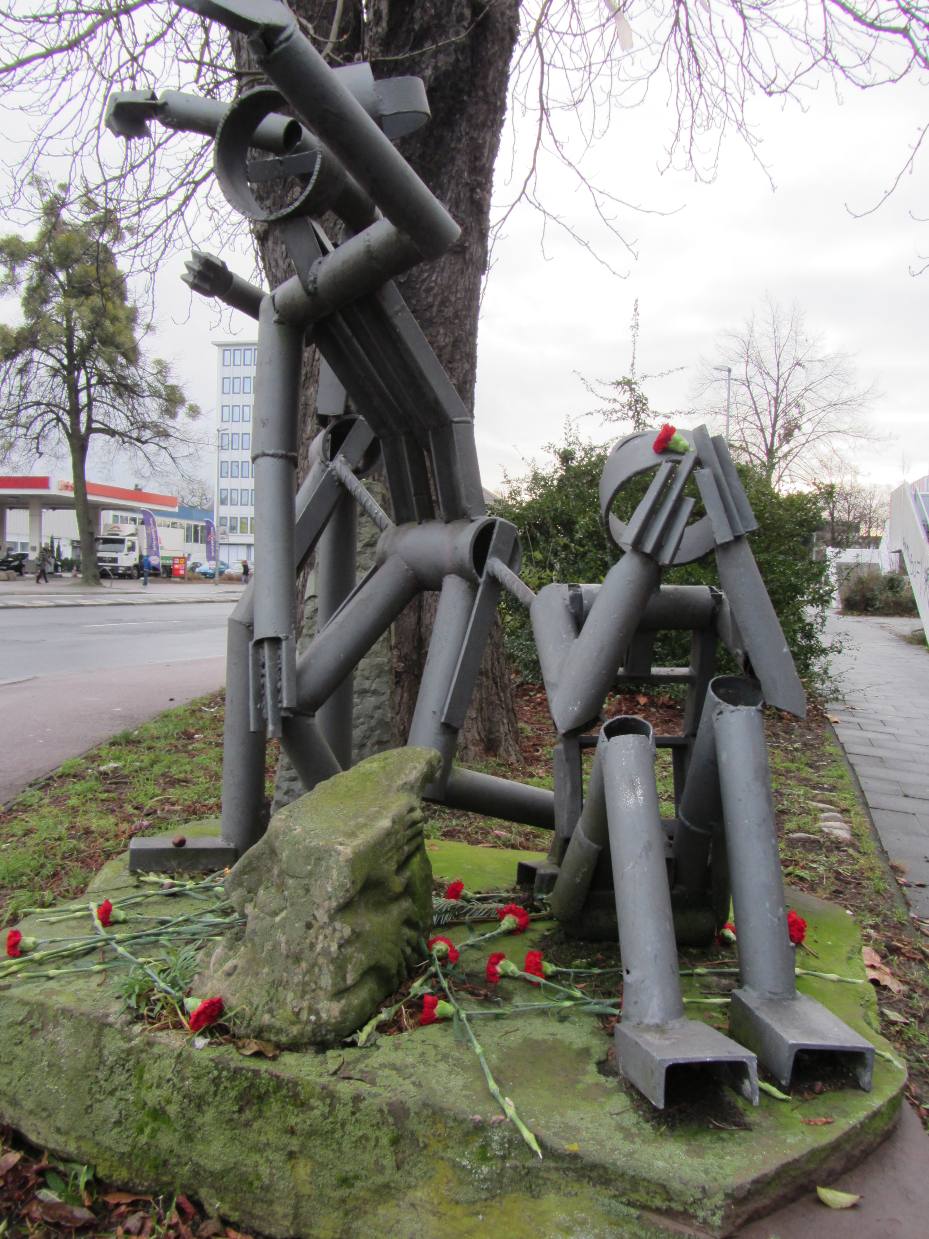 Gedenkskulptur für Conny Wessmann in der Weender Landstraße in Göttingen. Sie starb am 17. November 1989 am Rande eines Polizeieinsatzes durch einen Verkehrsunfall. Zugrundeliegend waren Auseinanandersetzungen zwischen rechtsextremer und autonomer Szene.